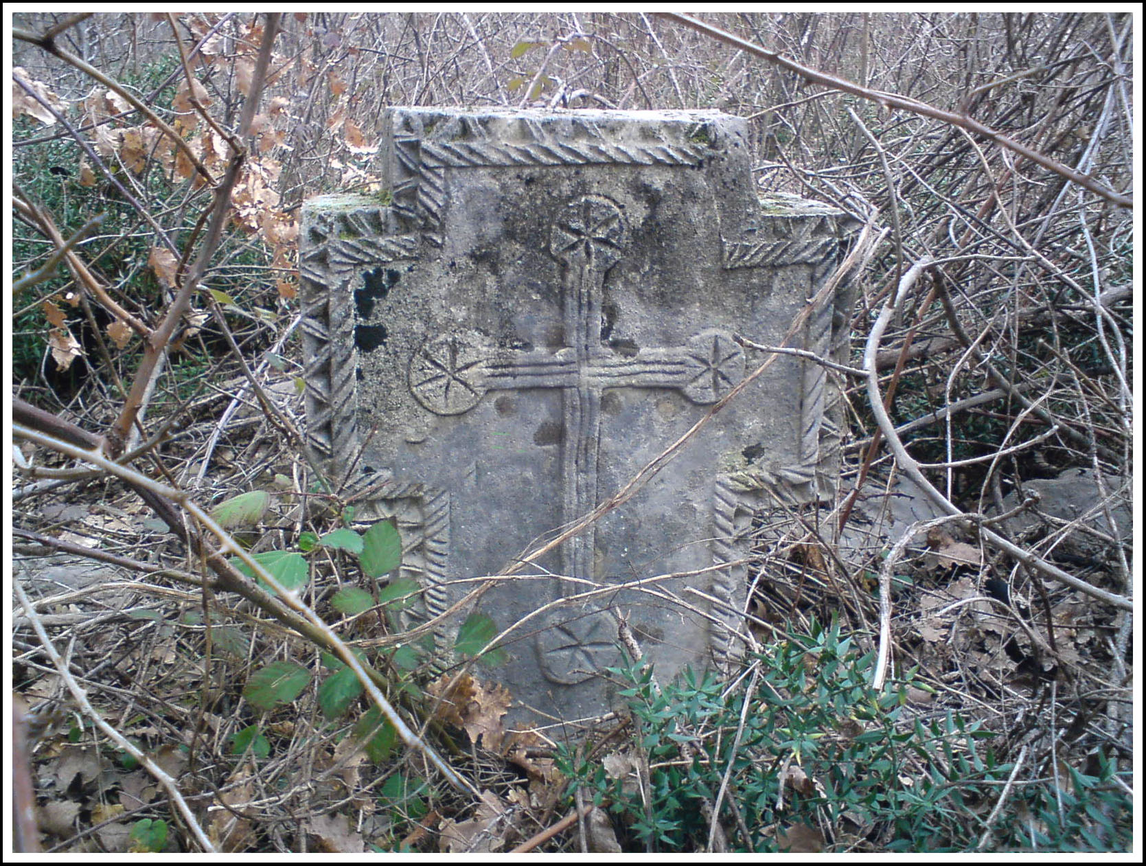 Stecak - Kuti